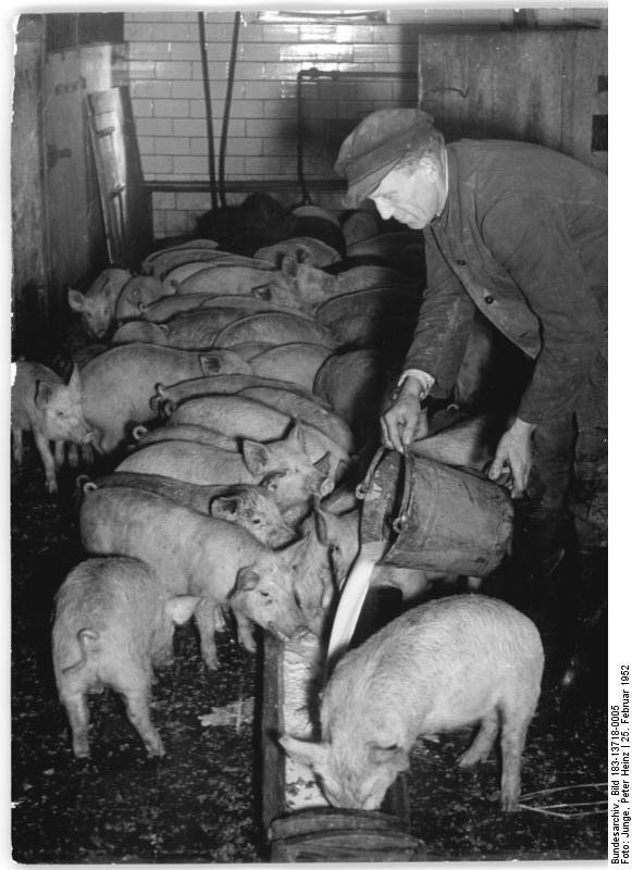 Zentralbild-Junge Kno-Qu. 25.2.52. Auf dem volkseigenen Gut in Buch b. Berlin. UBz, Werner Storbeck pflegt mit besonderer Liebe und Sorgfalt die ihm anvertrauten Ferkel.